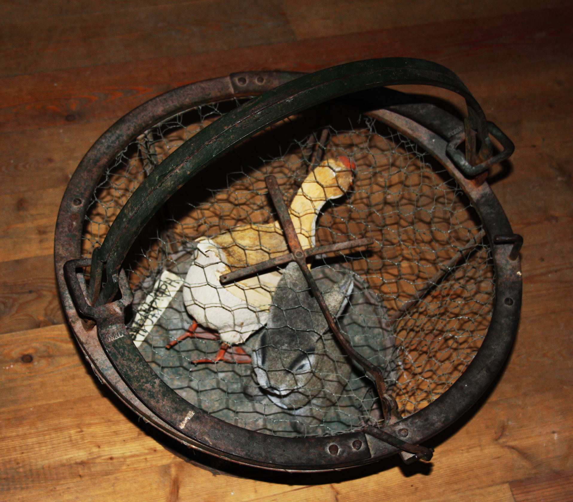 Falle zum Fang von Habichten.